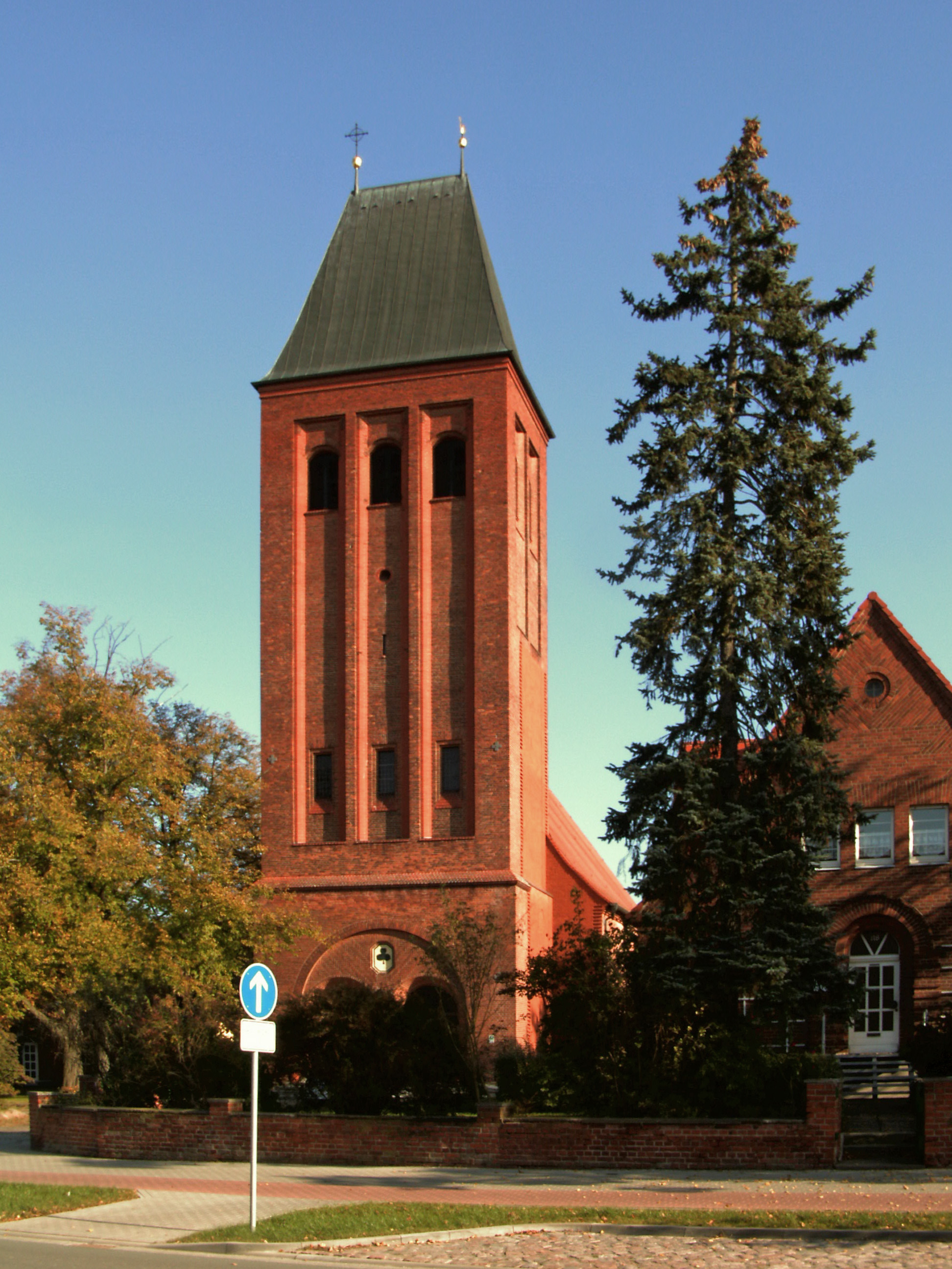 Katholische Kirche in Tangermünde, Landkreis Stendal